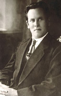 Пётр Апанасавіч Бузук